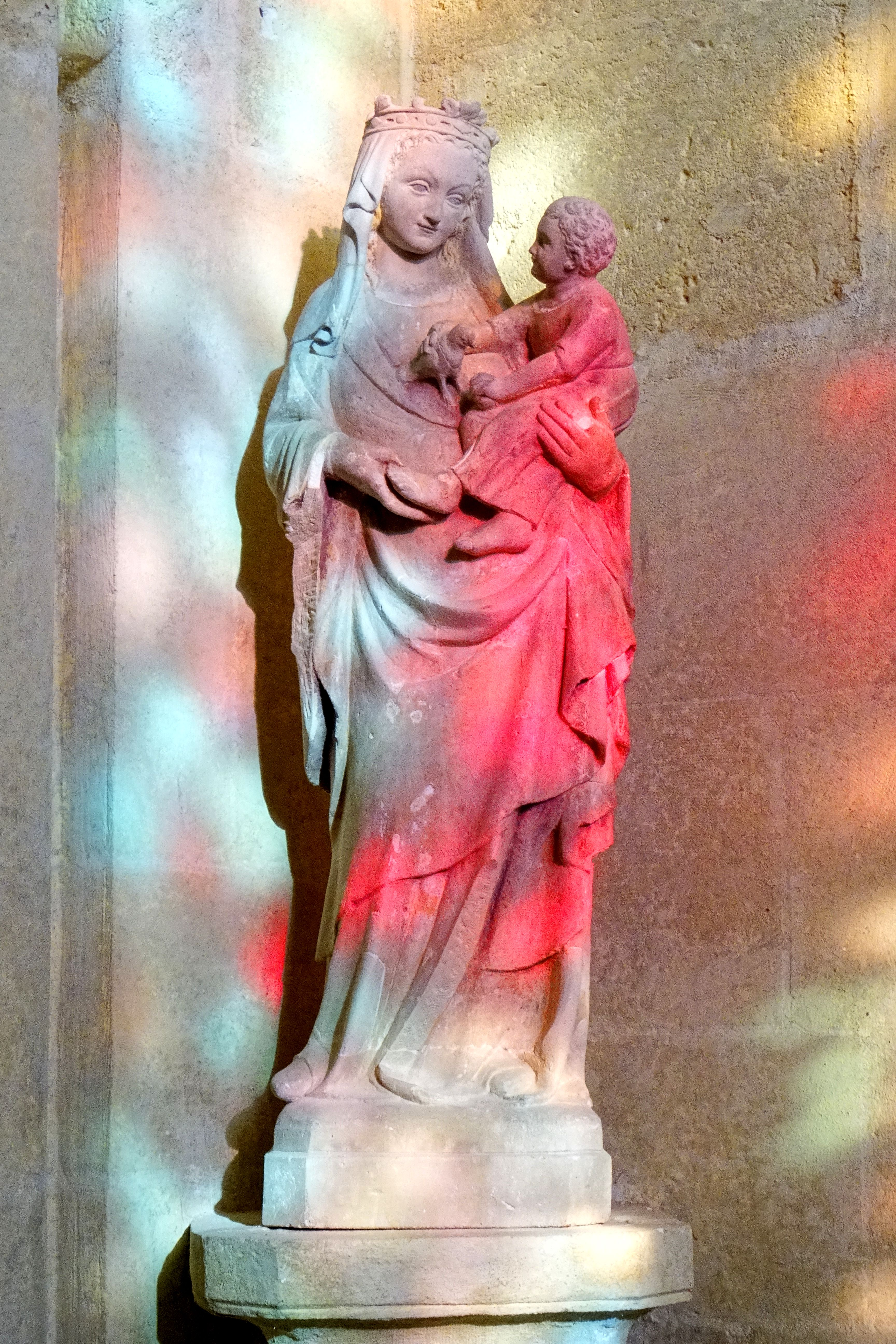 Vierge à l'Enfant en pierre calcaire, du premier quart du XVe siècle (selon le dossier de protection) ou du XIVe siècle (selon la notice d'inventaire).